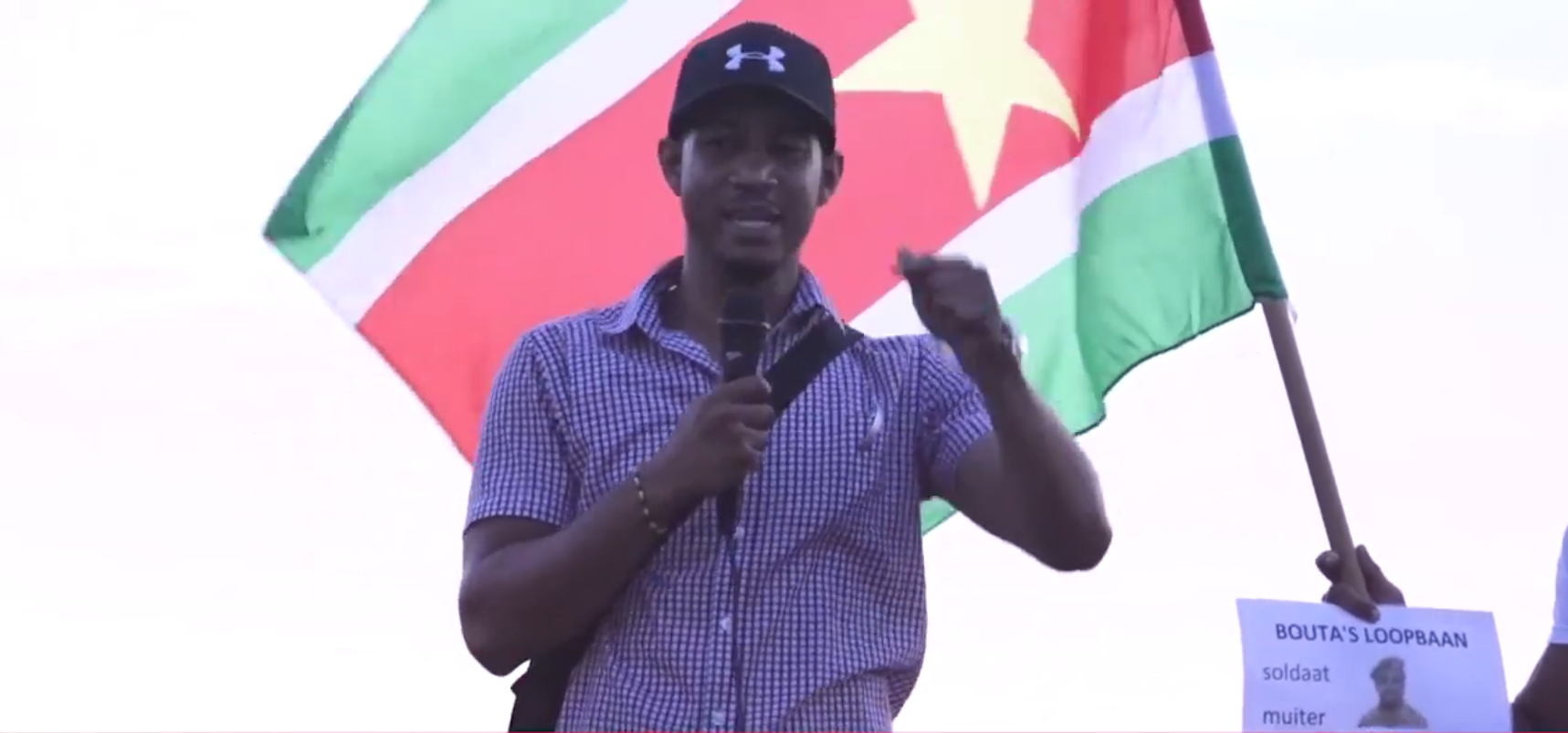 Bryan Boerleider, 2016